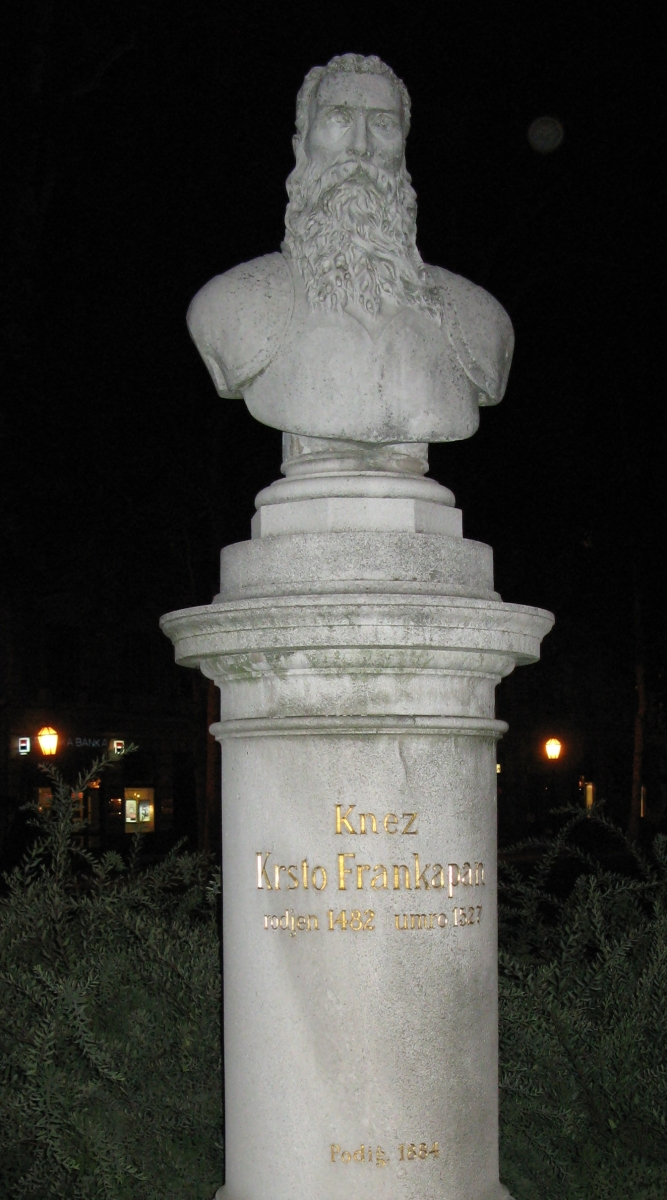 ban i knez Krsto Frankopan Ozaljski